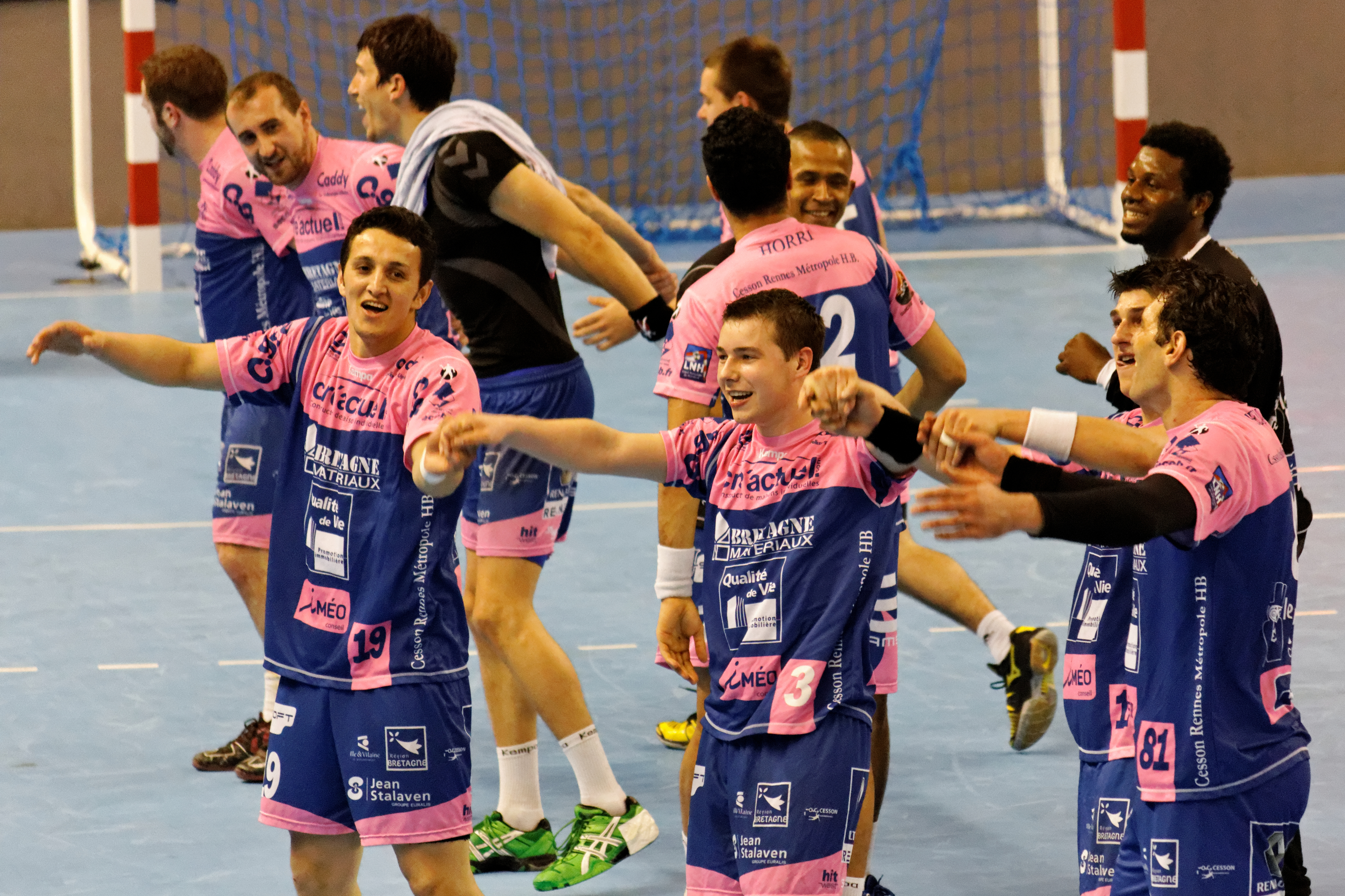 Match Cesson-Rennes MHB contre Montpellier AH, le 12 mai 2012.